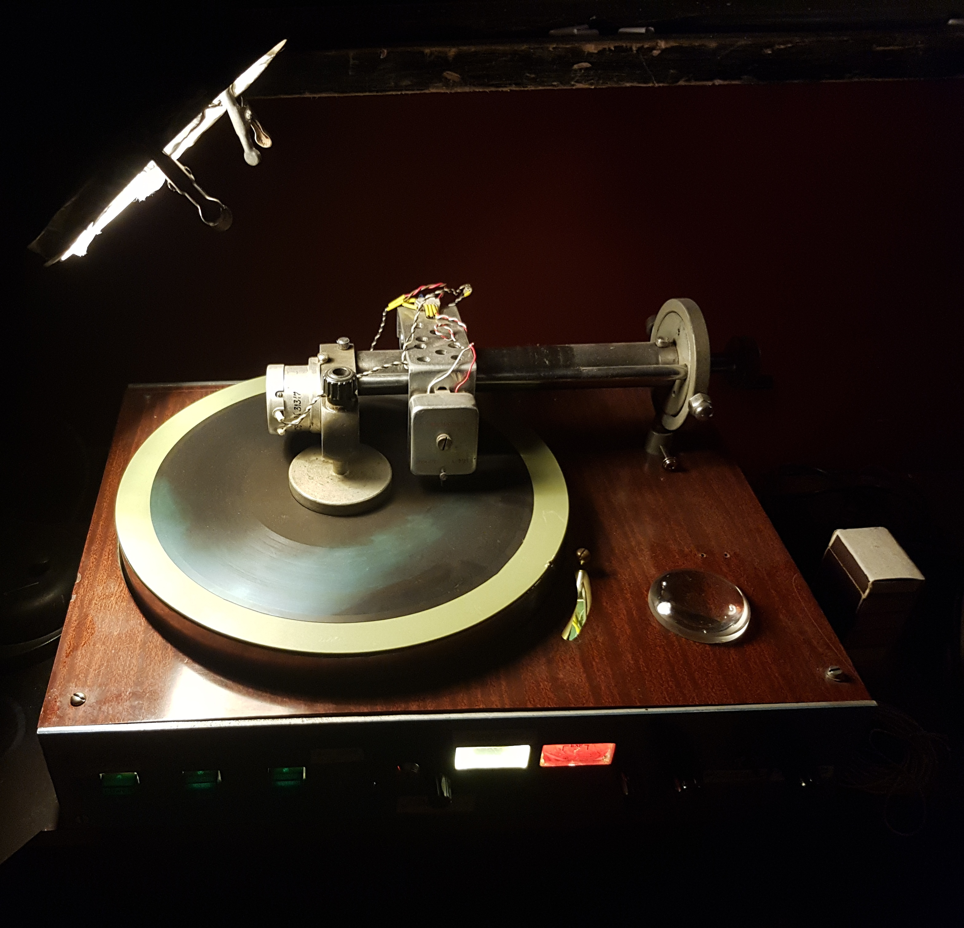 Рекордер для кустарной звукозаписи